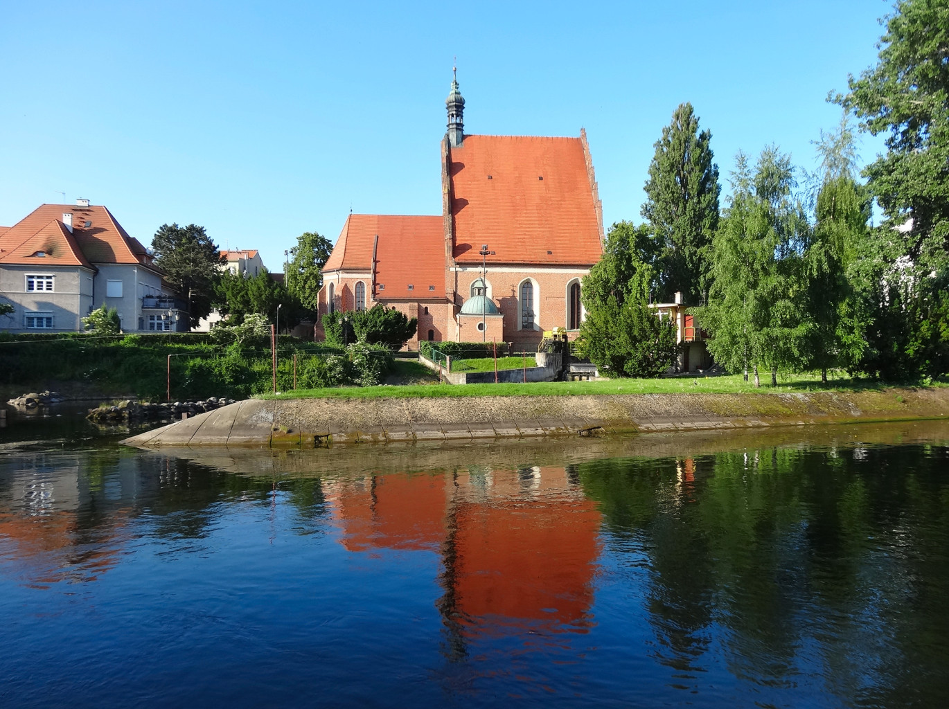 Katedra p.w. św. Marcina i Mikołaja w Bydgoszczy (XIV-XV wiek) nad Brdą